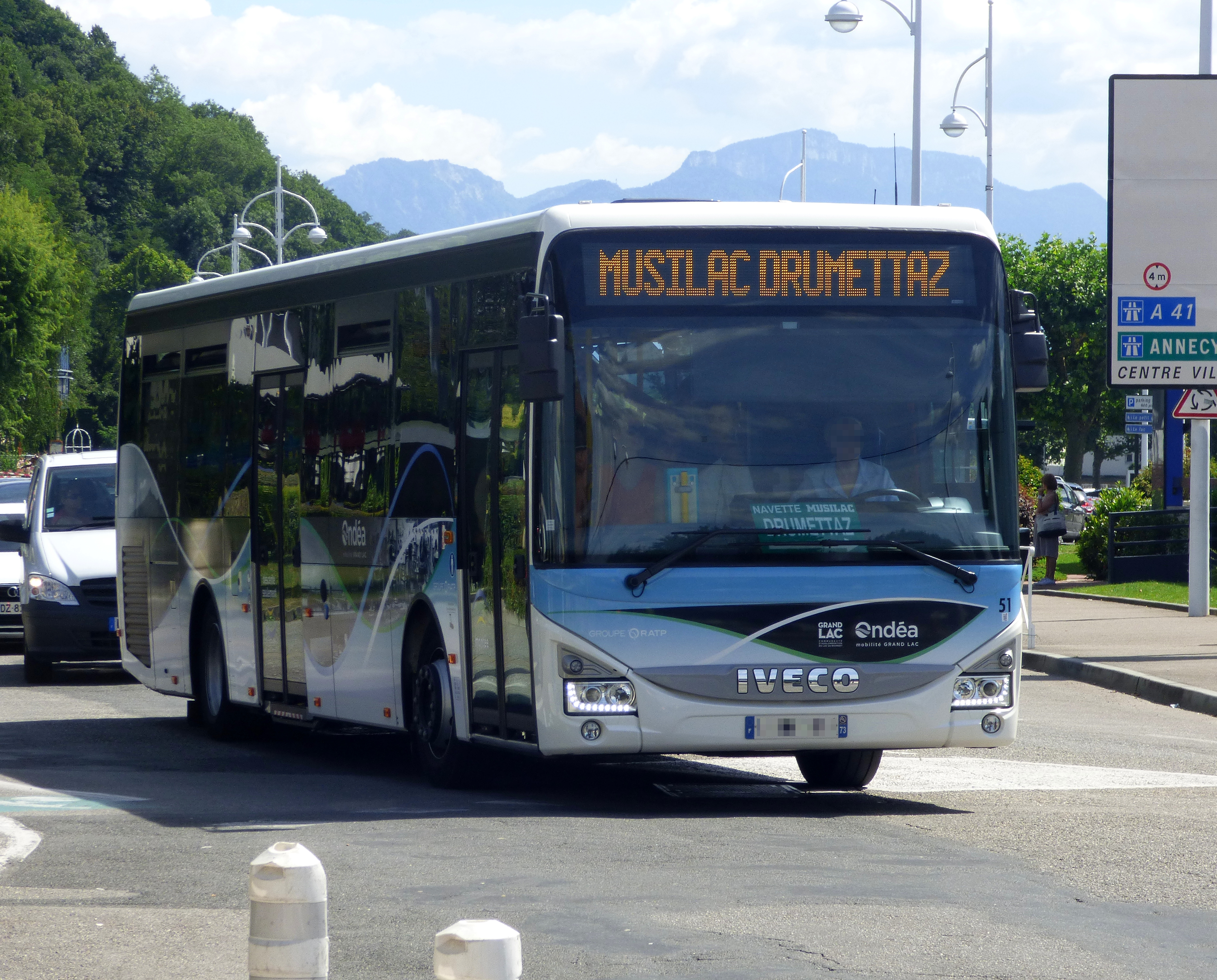 Une ligne spéciale mise en place pour le festival Musilac à Aix-les-Bains en juillet 2017.